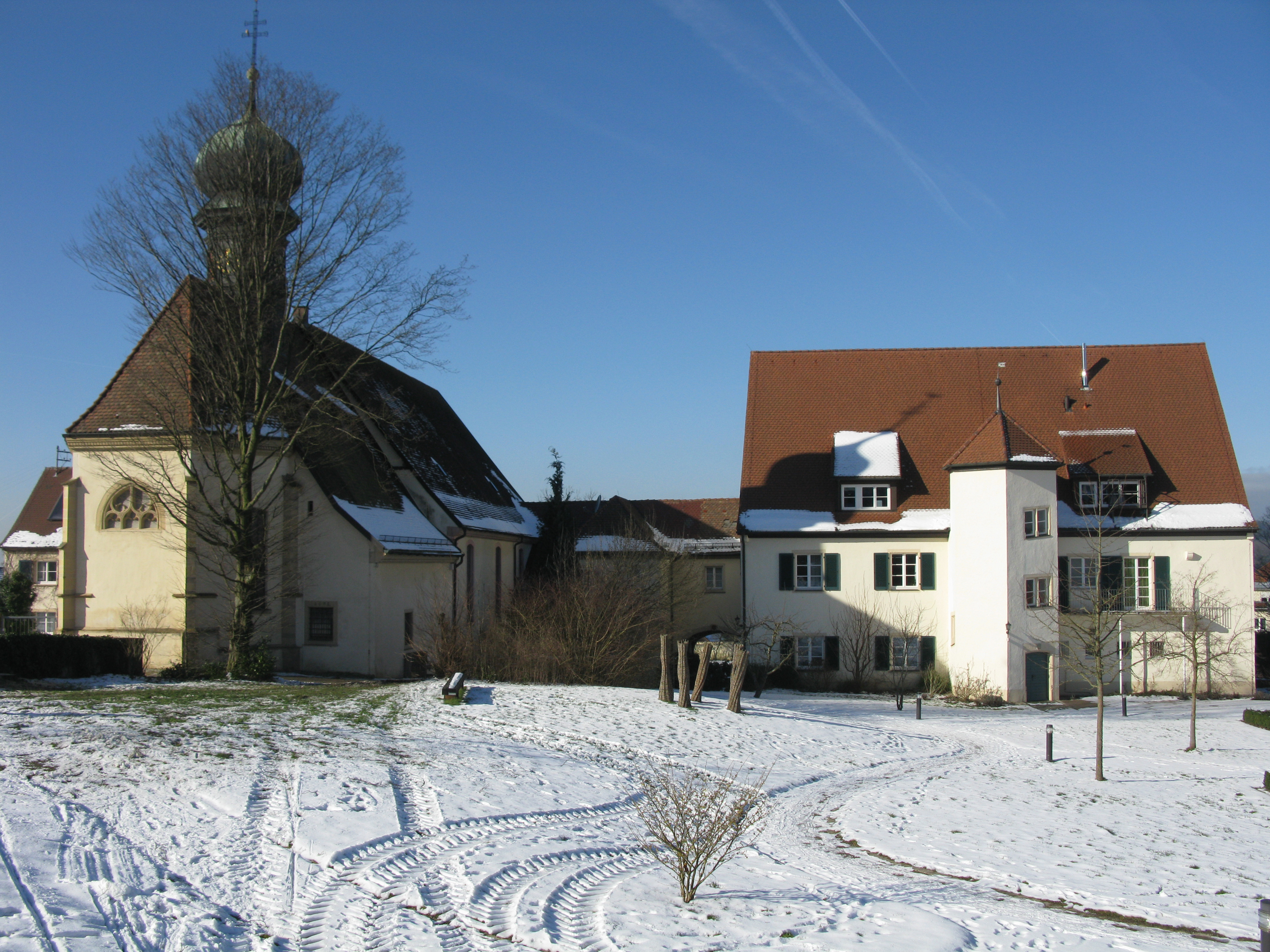 Ehemaliges Kloster von Sölden im Schwarzwald, St. Fides und Markus mit Priorat